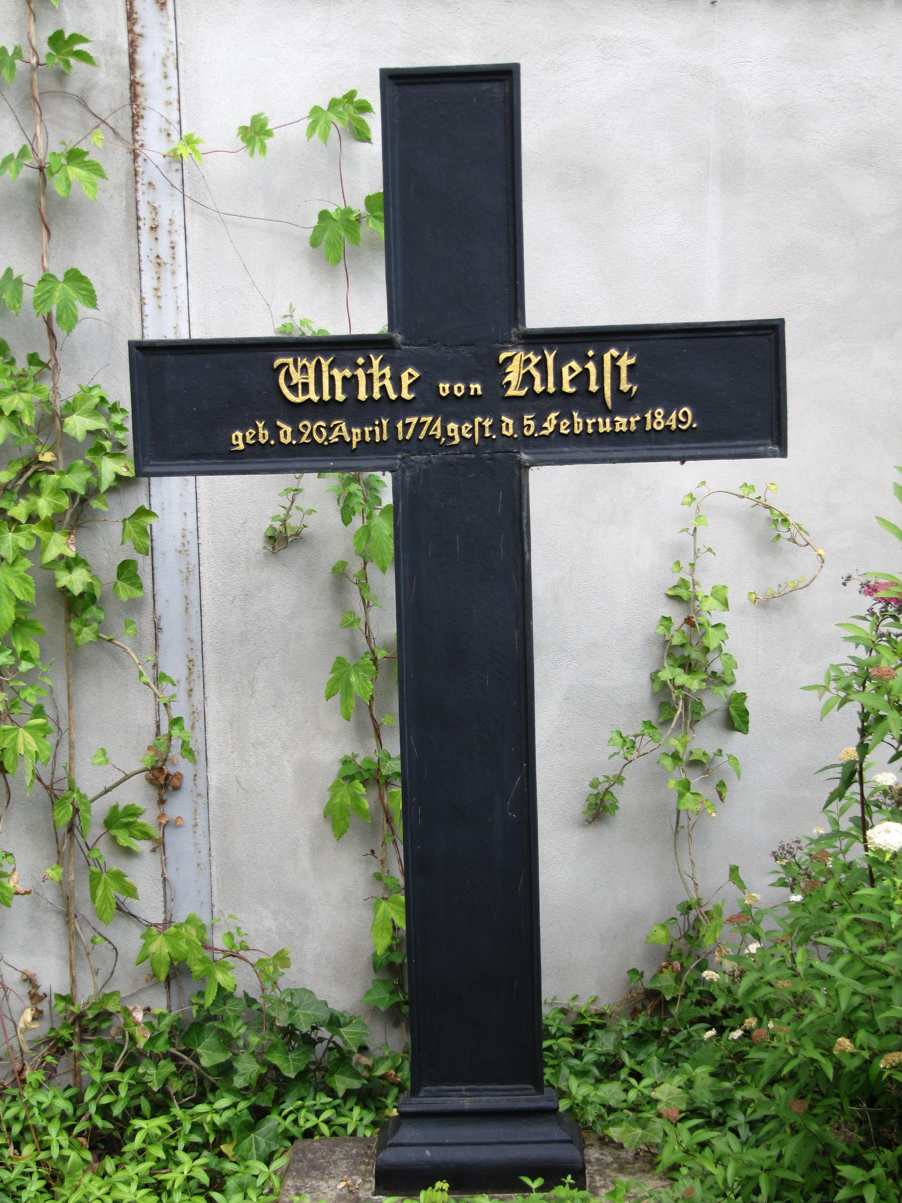 Grabkreuz von Ulrike von Kleist (1774–1849), der Halbschwester Heinrich von Kleists